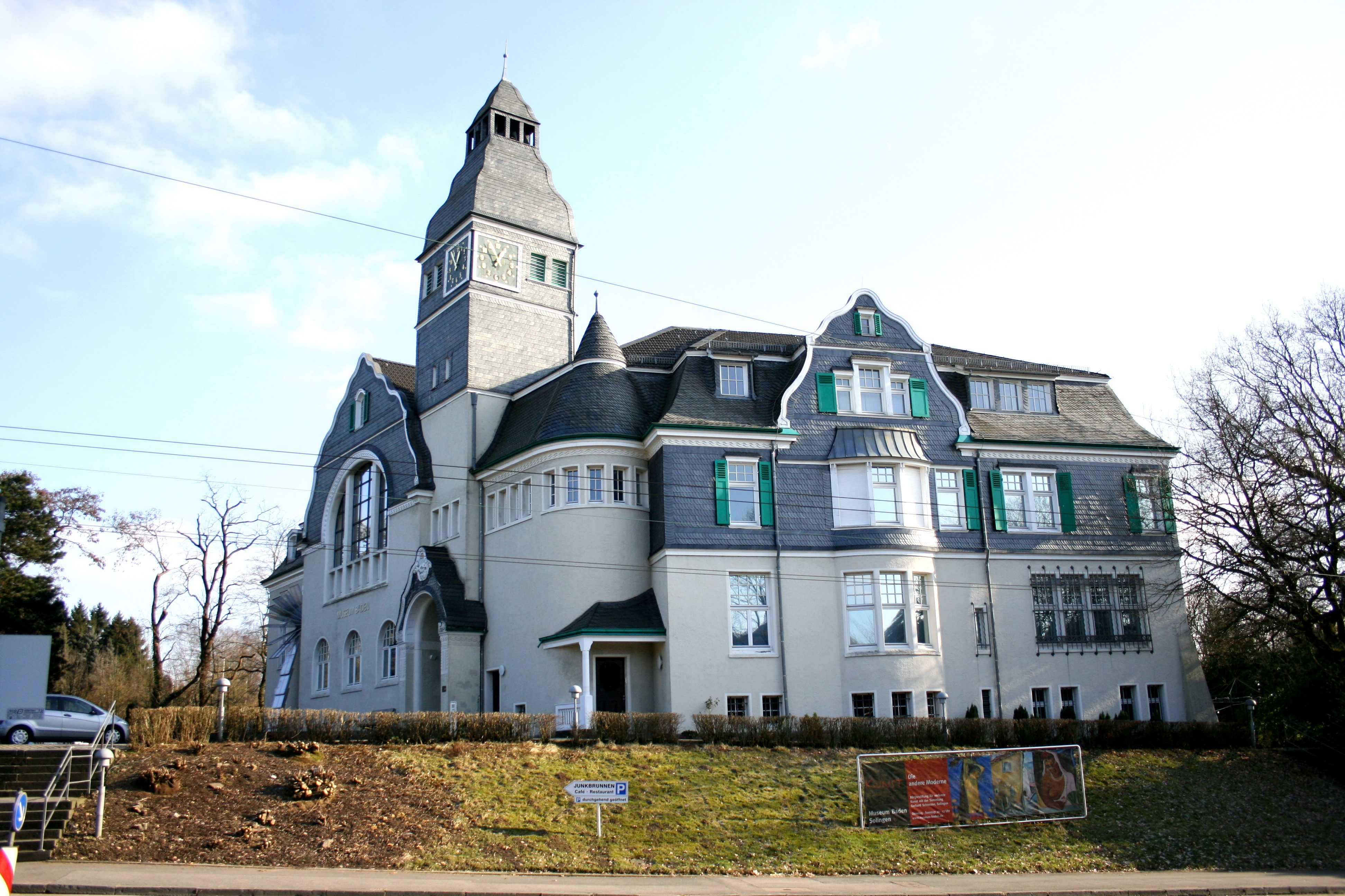 Museum Baden in Solingen-Gräfrath